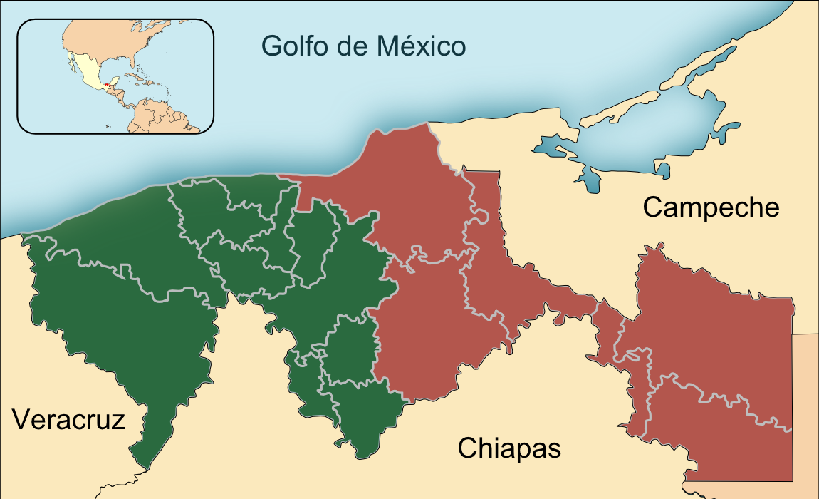 Regiones hidrográficas de Tabasco Región Usumacinta. Región Grijalva.